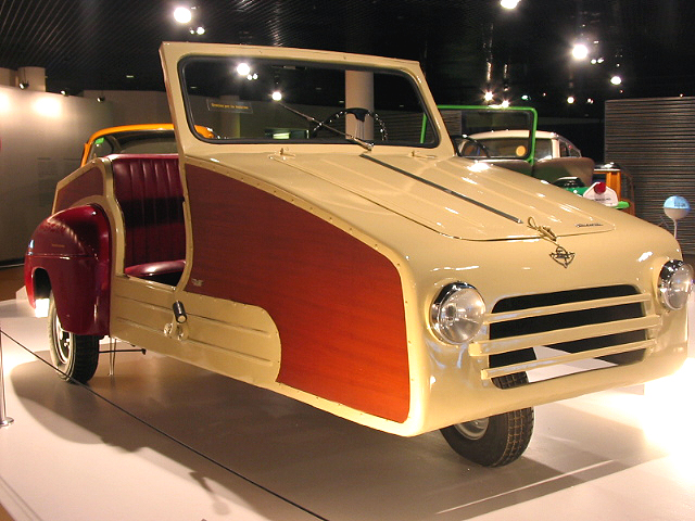 Fotografía digital realizada por Pablo Alberto Salguero Quiles